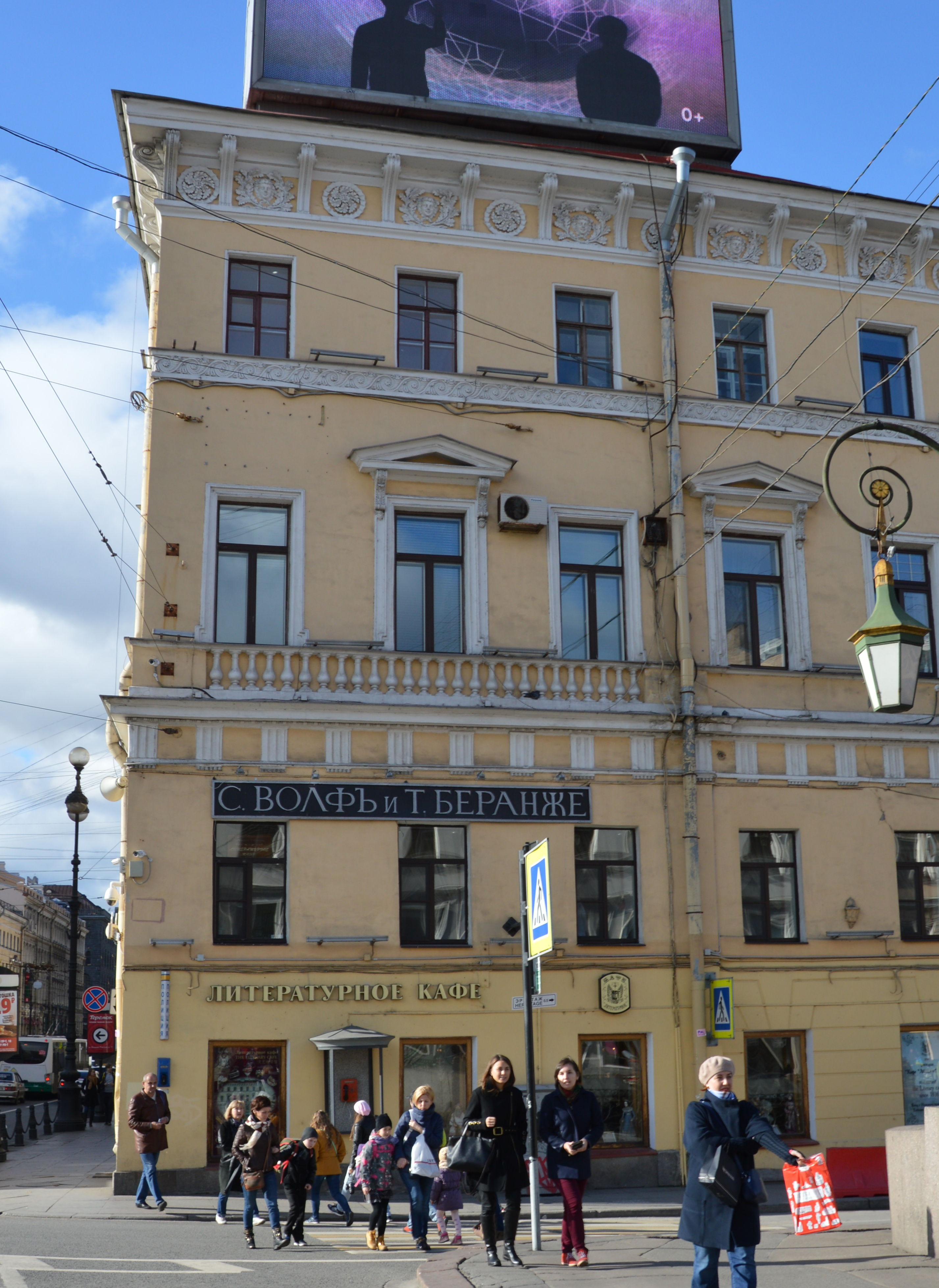 Literaturcafe Sankt Petersburg